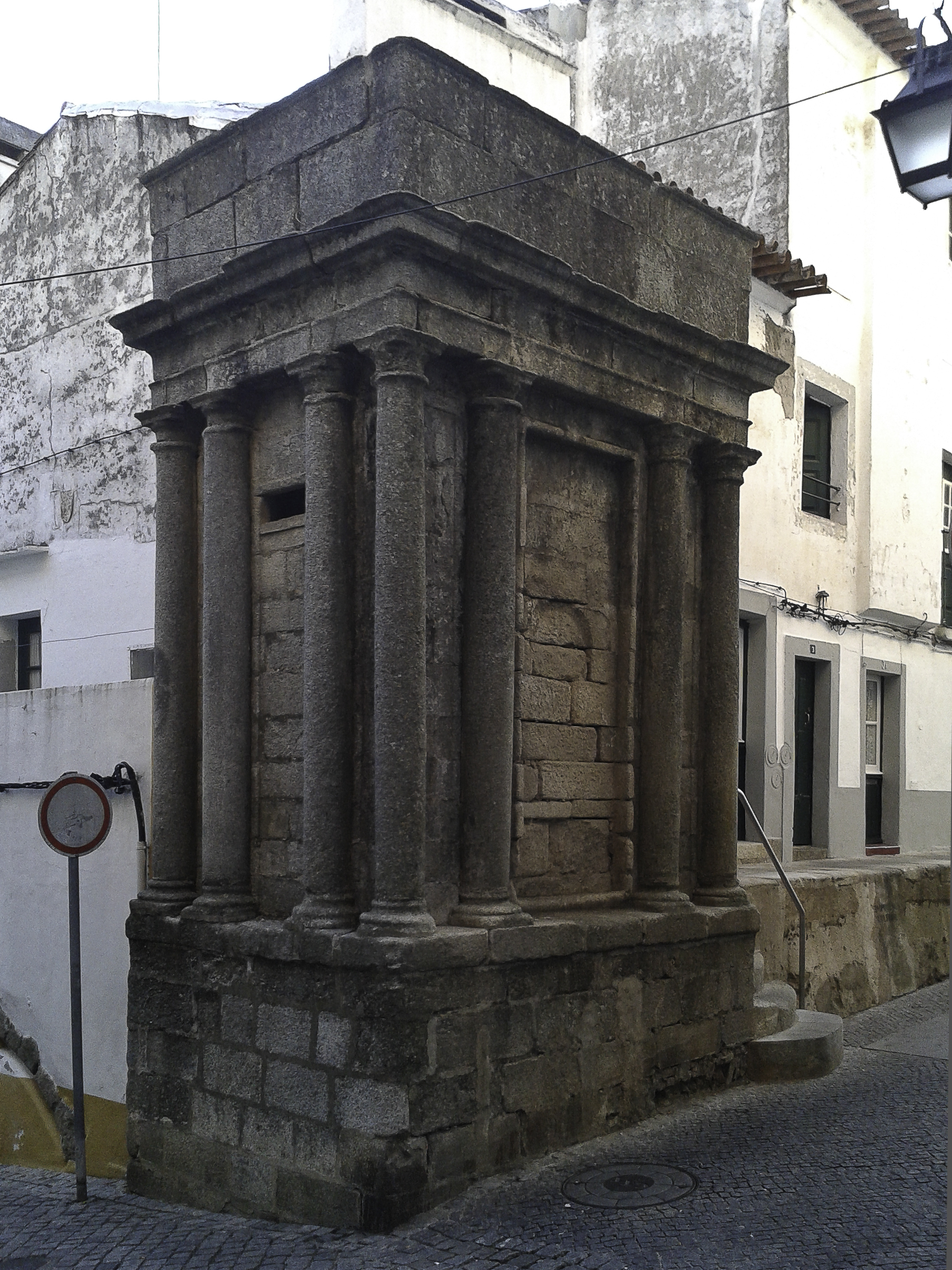 Caixa de água renascentista localizada na antiga Rua Nova da extinta freguesia de Santiago de Évora. Este local onde a cerca velha foi cortada foi a escolha do arquiteto régio Francisco de Arruda para construir uma caixa de água abastecida pelo Aqueduto da Água da Prata. Tem planta quadrangular e na actualidade tem dois lados visíveis, com doze colunas.